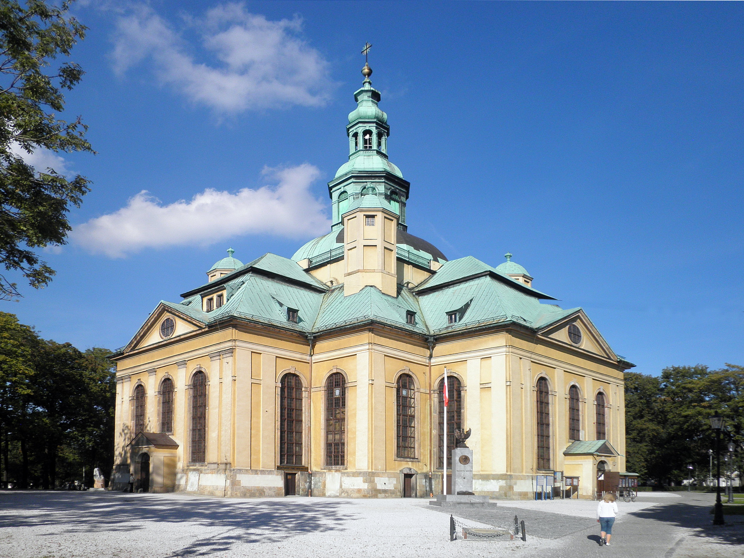 zespół kościoła ewangelickiego, ob. rzym.-kat. pw. Świętego Krzyża, 1709-1718:- d. ewangelicki kościół Łaski, ob. kościół garnizonowy ul. 1-go Maja 45, Miasto Jelenia Góra